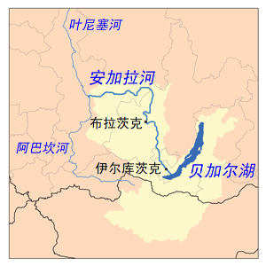 安加拉河流域。